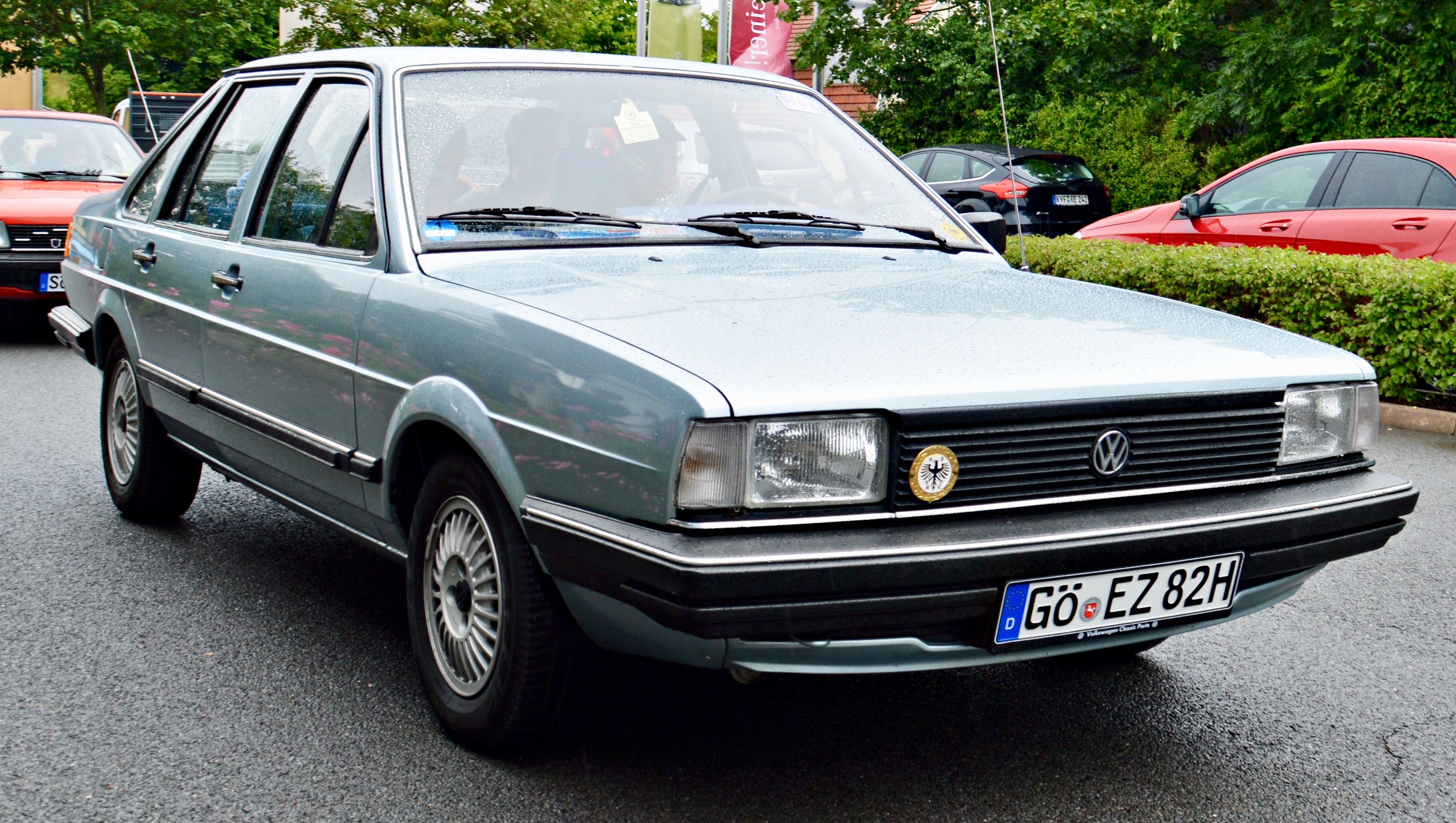 Ein VW Santana, Baujahr 1982, bei der Ausfahrt zahlreicher Teilnehmer des 11. Greußener Oldtimertreffens. Die Ausfahrt führte in diesem Jahr nach Sondershausen, dort konnten die Fahrzeuge auf dem Gelände des Autohauses Peter besichtigt werden.